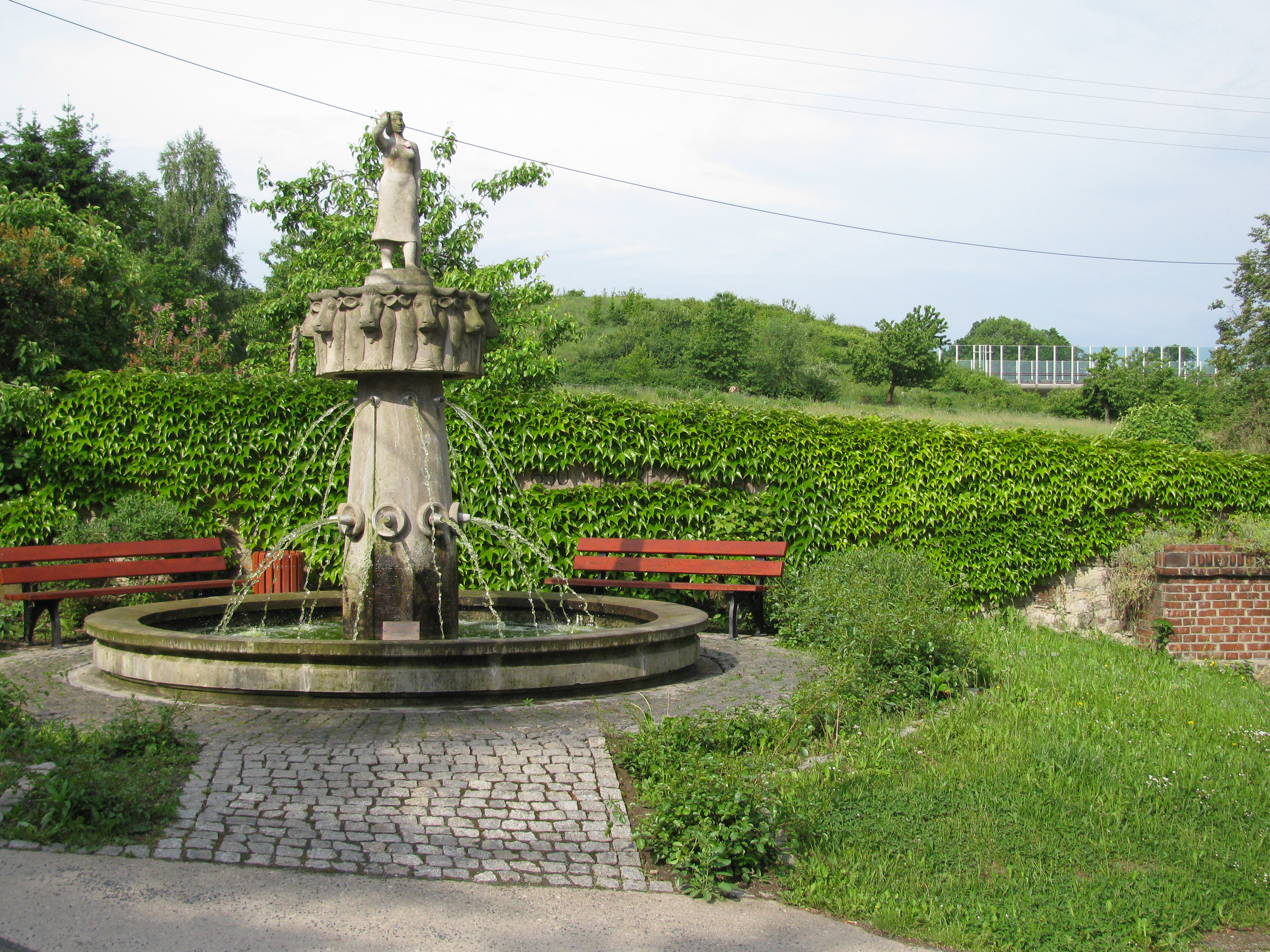 Brunnen in Zöllmen, Ortsteil von Dresden. Im Hintergrund rechts die Autobahn 17 Dresden-Prag nahe der Anschlussstelle Dresden-Gorbitz